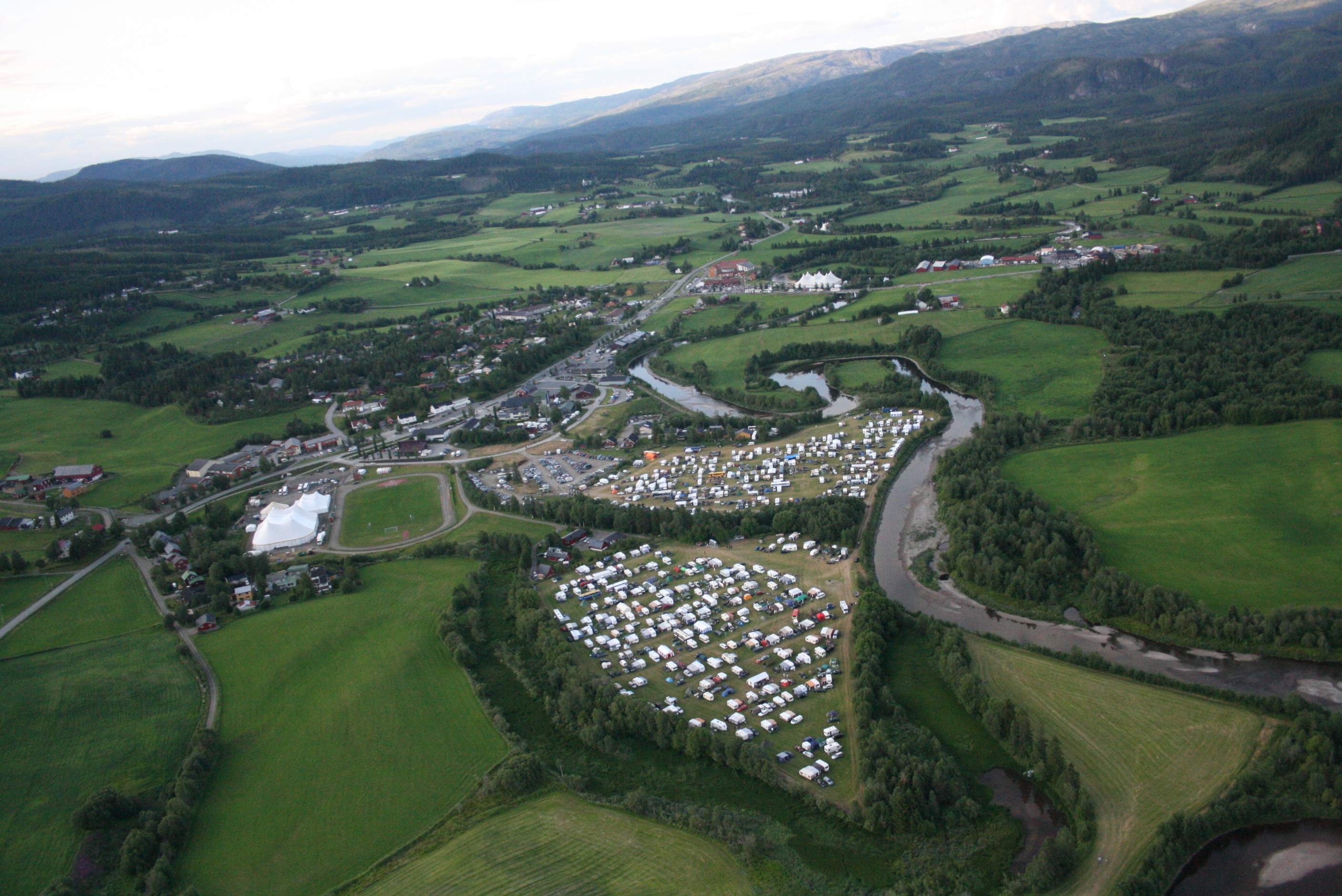 Høylandet frå lufta under Norsk revyfestival 2007